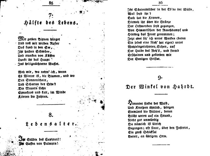 Seiten 85-86 von Wilmans Taschenbuch für das Jahr 1805.